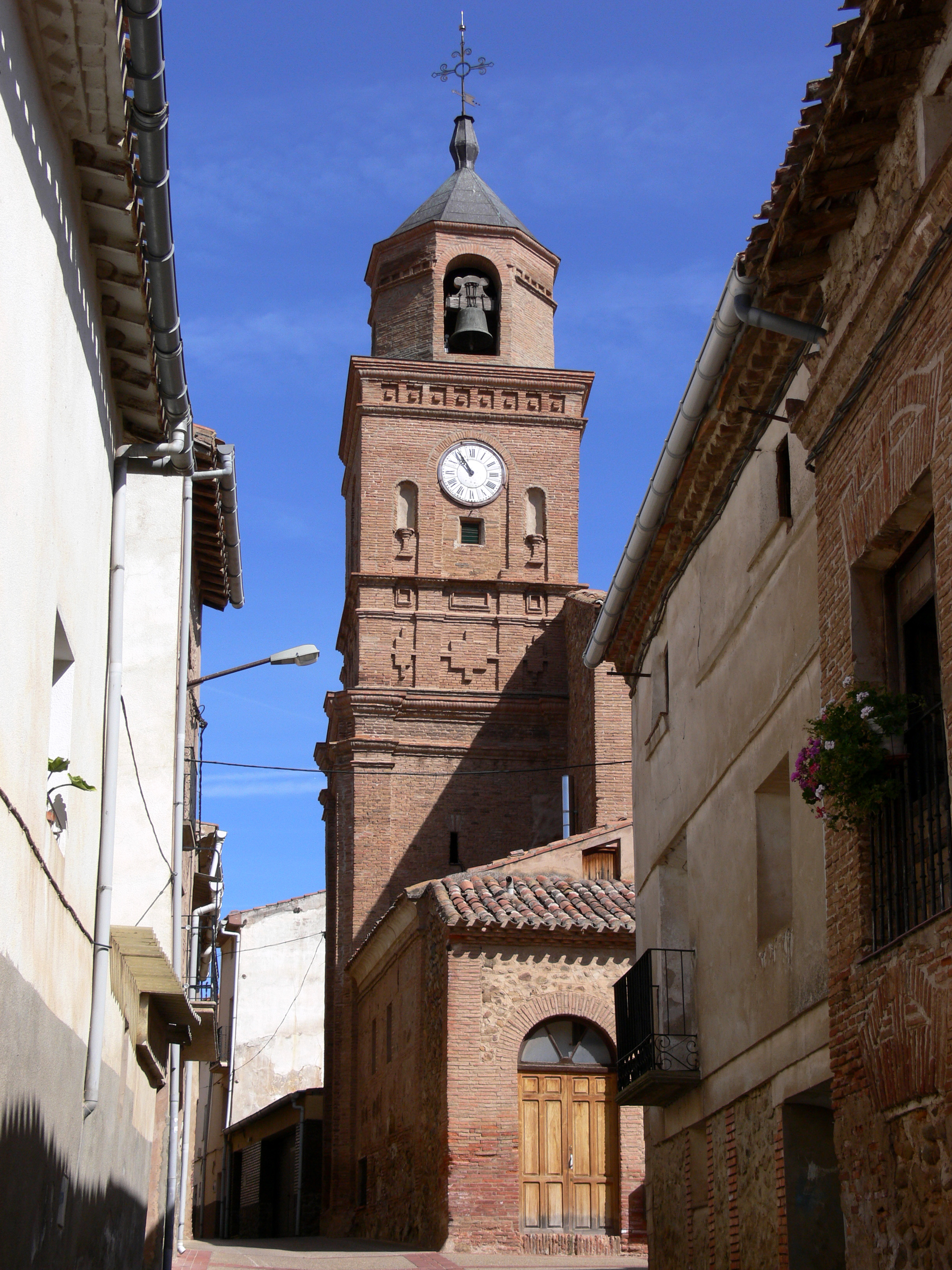 BERGASA. Iglesia de la Asunción (sXVII-XVIII).